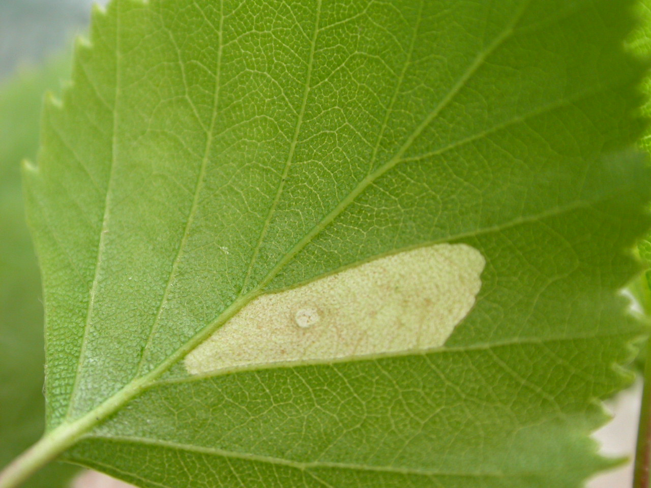 Coleophora serratella, feeding signs, Hellerup, Denmark, 12 May 2003